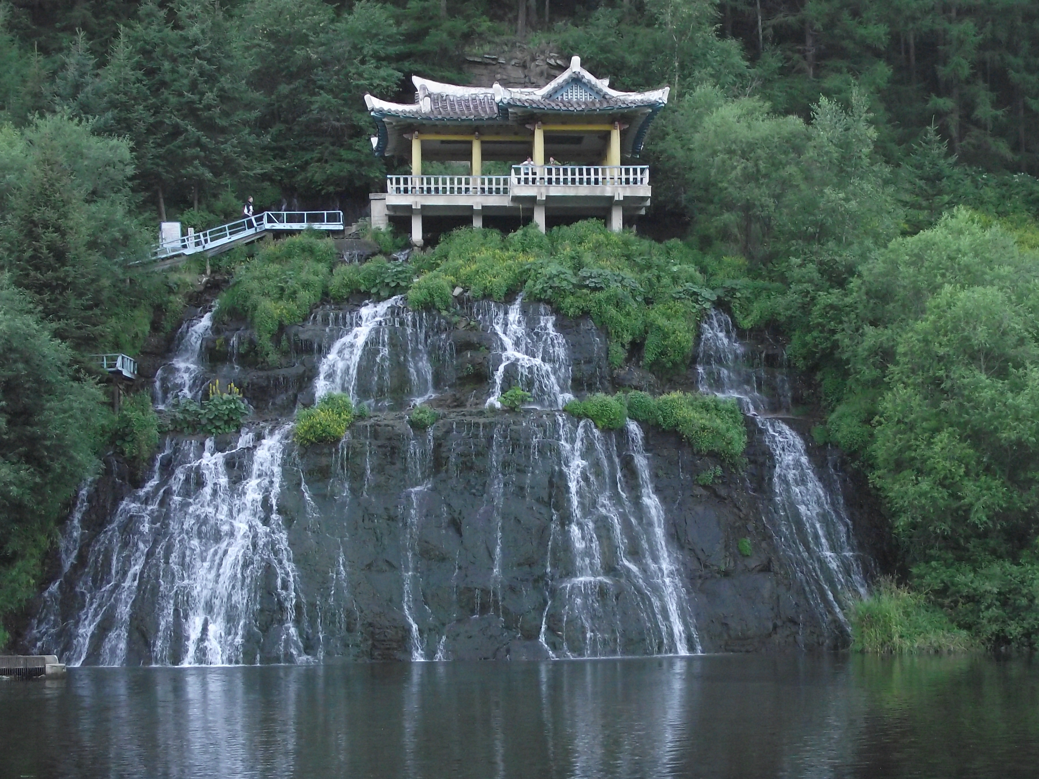 Rimyongsu Falls